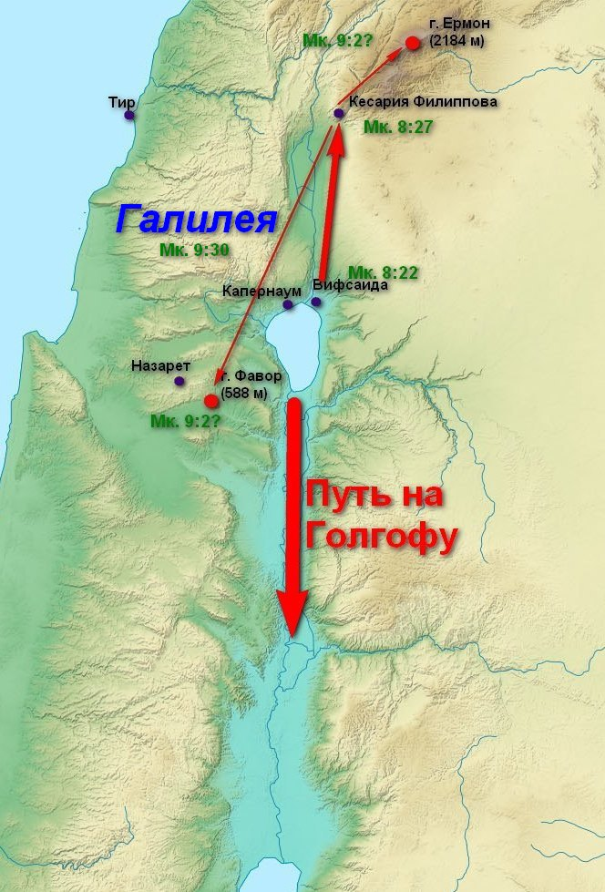 Гора преображения: Ермон или Тавор